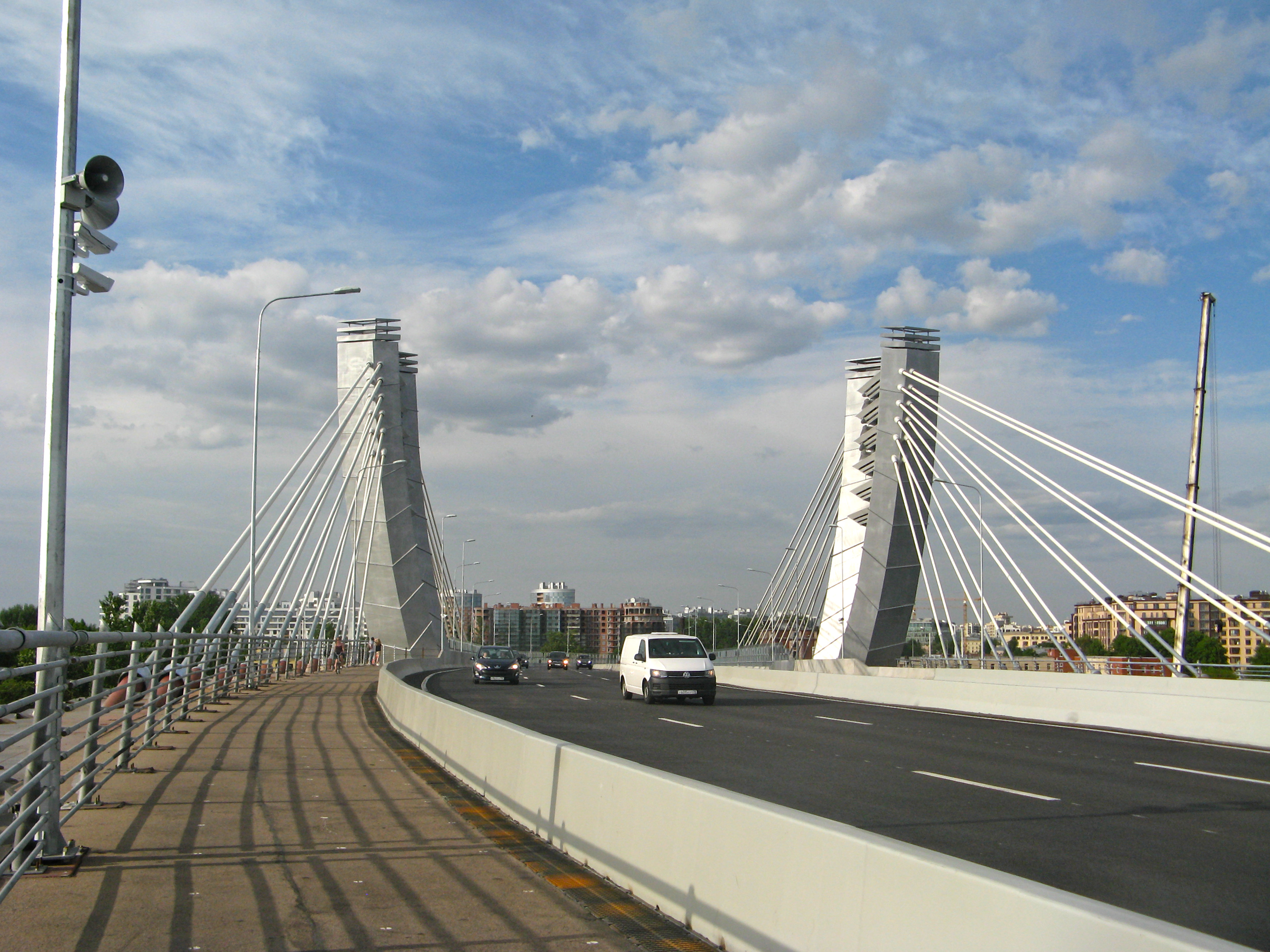 Мост Бетанкура в Санкт-Петербурге